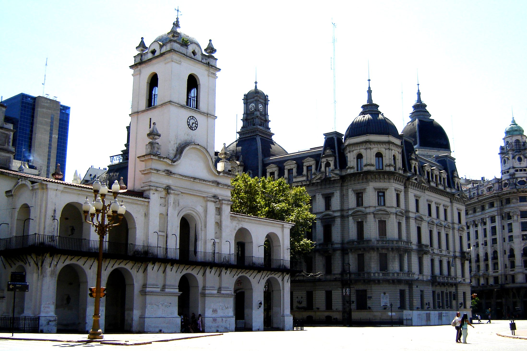 Colonial Cabildo (left) and former Buenos Aires City Hall. Plaza de Mayo, Buenos Aires, Argentina.